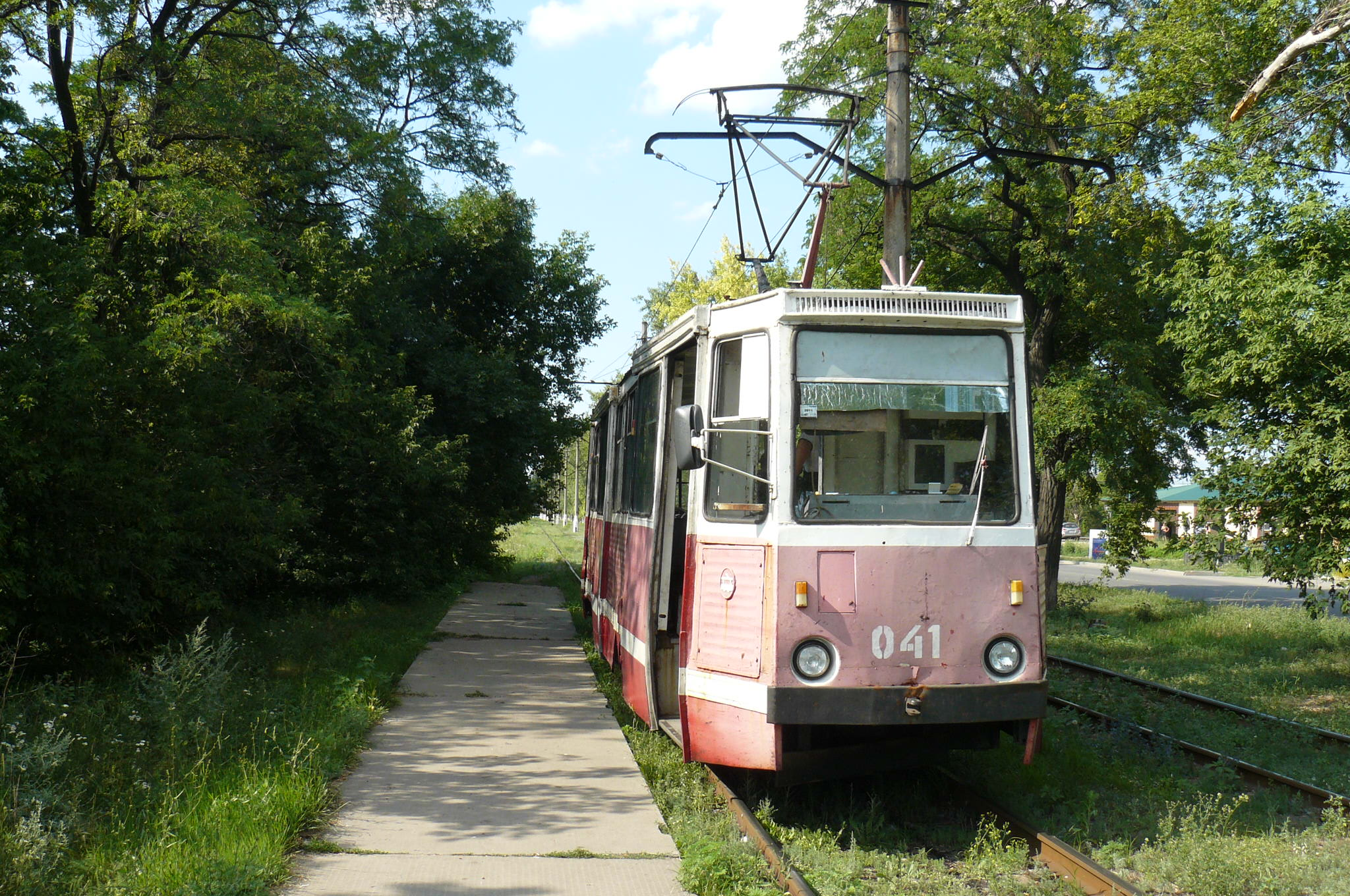 Trams in Avdijivka (Ukraina).